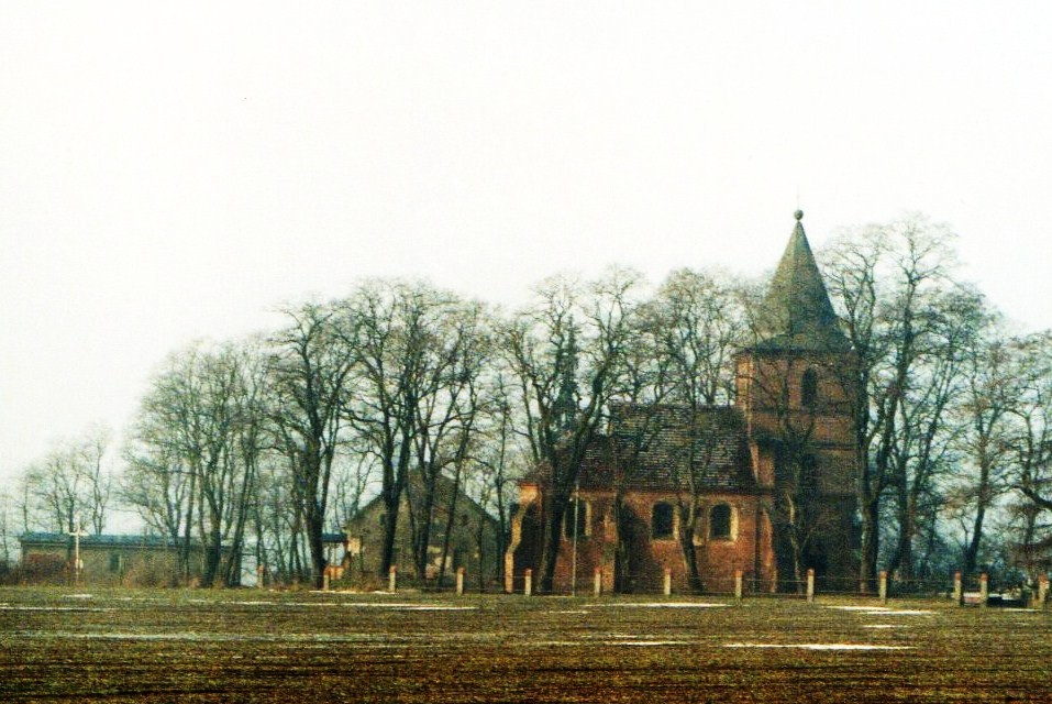 Kościół św. Jana Chrzciciela - Janikowo, 1996r.